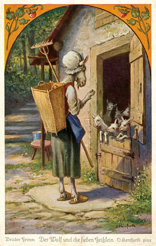 Der Wolf und die sieben Geißlein. Postkartenserie nach dem Märchen. Serie von sechs Postkarten der Firma Uvachrom. Serie 265, Nr. 4516 Text der Rückseite: Es war einmal eine alte Geiß. Sie hatte sieben junge nette Geißlein. Als sie zum Futterholen ging, rief sie alle sieben herbei und mahnte: „Seid auf eurer Hut vor dem Wolf. Wenn er kommt, so frißt er euch. Er ist schlau und verstellt sich oft.“ Dann meckerte die Alte und sprang getrost davon.